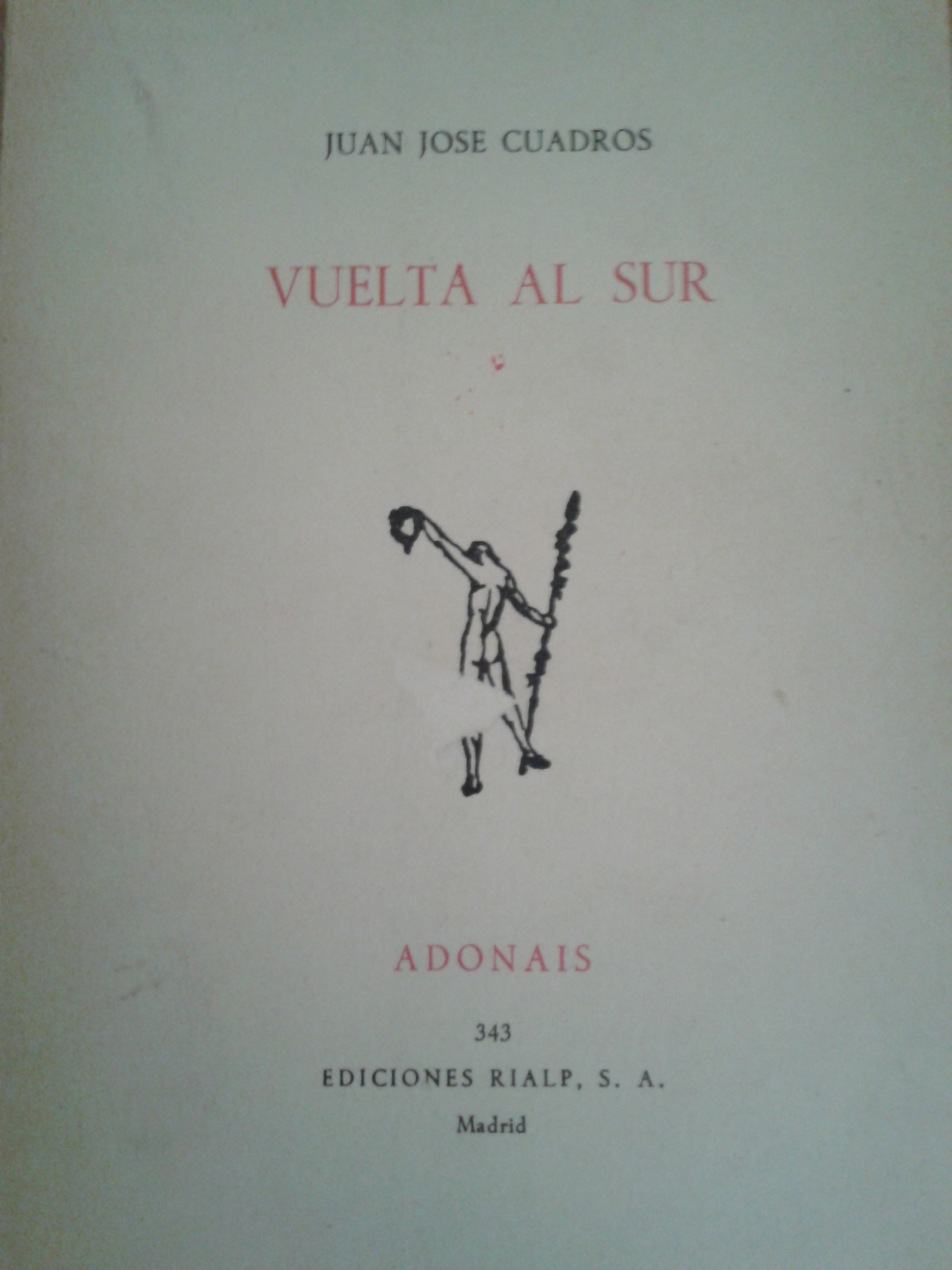 Vuelta al Sur de Juan José Cuadros